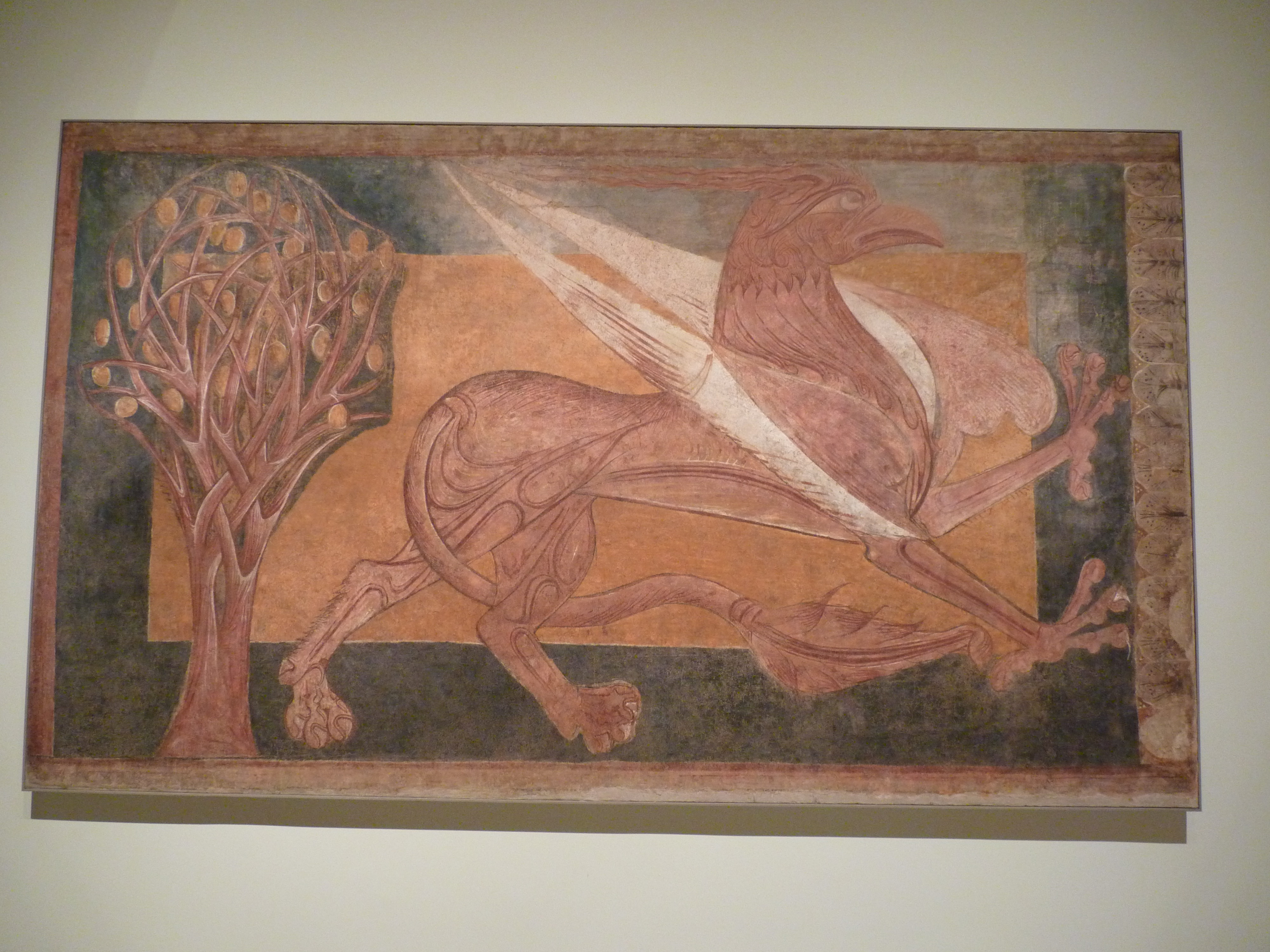 Pintures d'Arlanza: Griu. ANÒNIM. CASTELLA. BURGOS. Cap a 1210